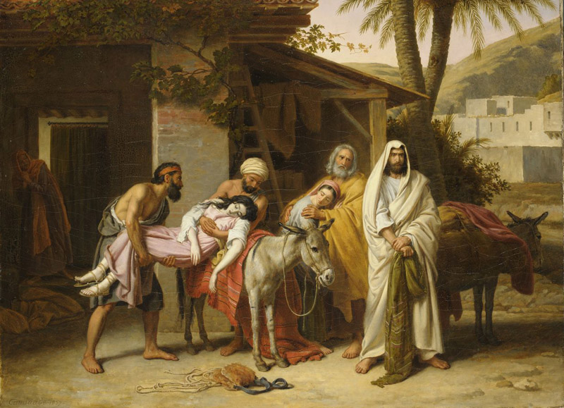 The Levite of Ephraim (Le Lévite d’Ephraïm méditant de venger sa femme morte victime de la brutalité des Benjamites), 1837, Alexandre-François Caminade (French Academic Painter, 1783-1862), oil on canvas, 60 x 81 cm, Musée des Beaux-Arts de Lyon, Lyon, France. Large size here.